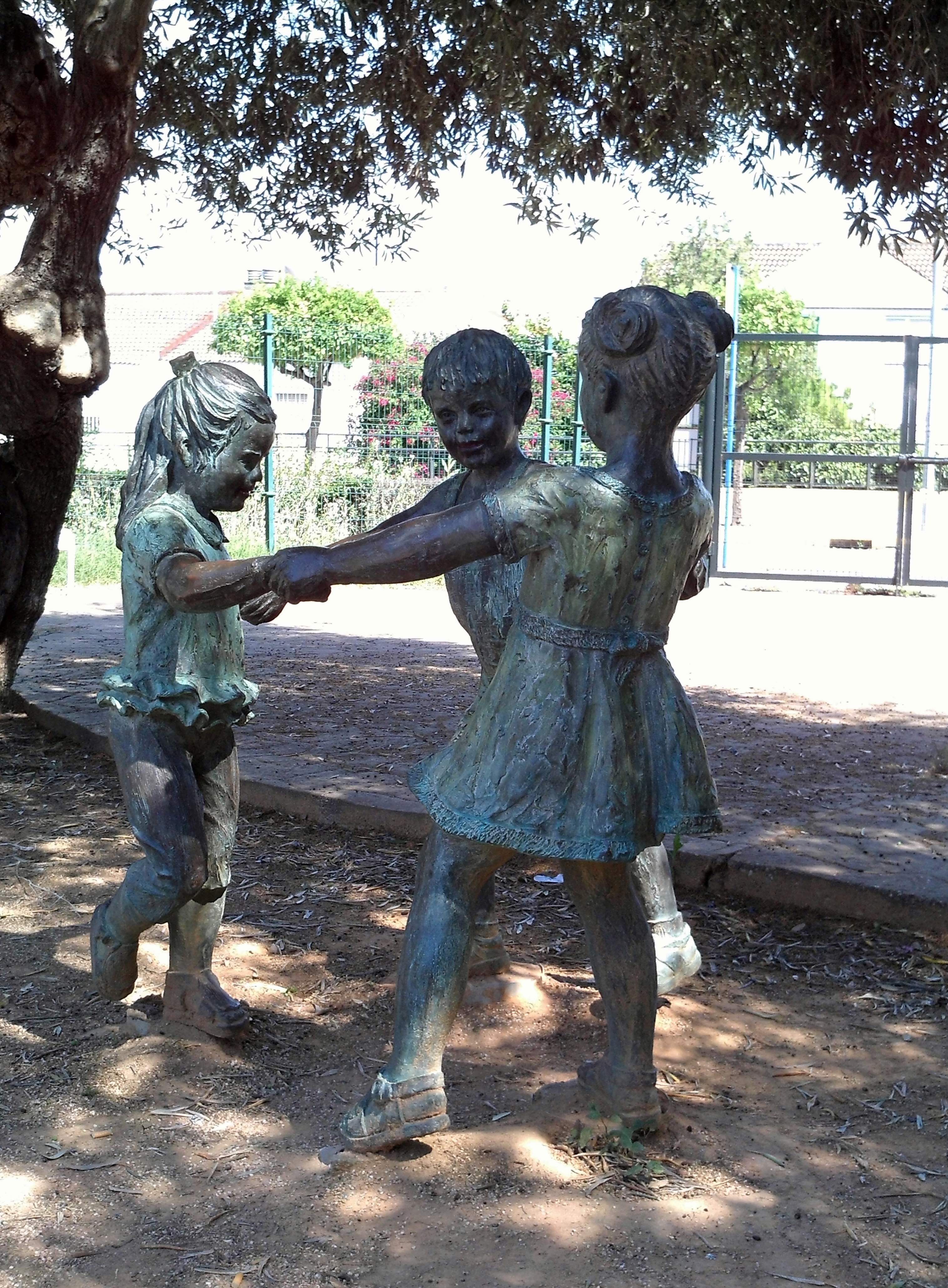 Estatua de unos niños haciendo el corro de la patata. Mairena del Aljarafe, provincia de Sevilla, Andalucía, España.